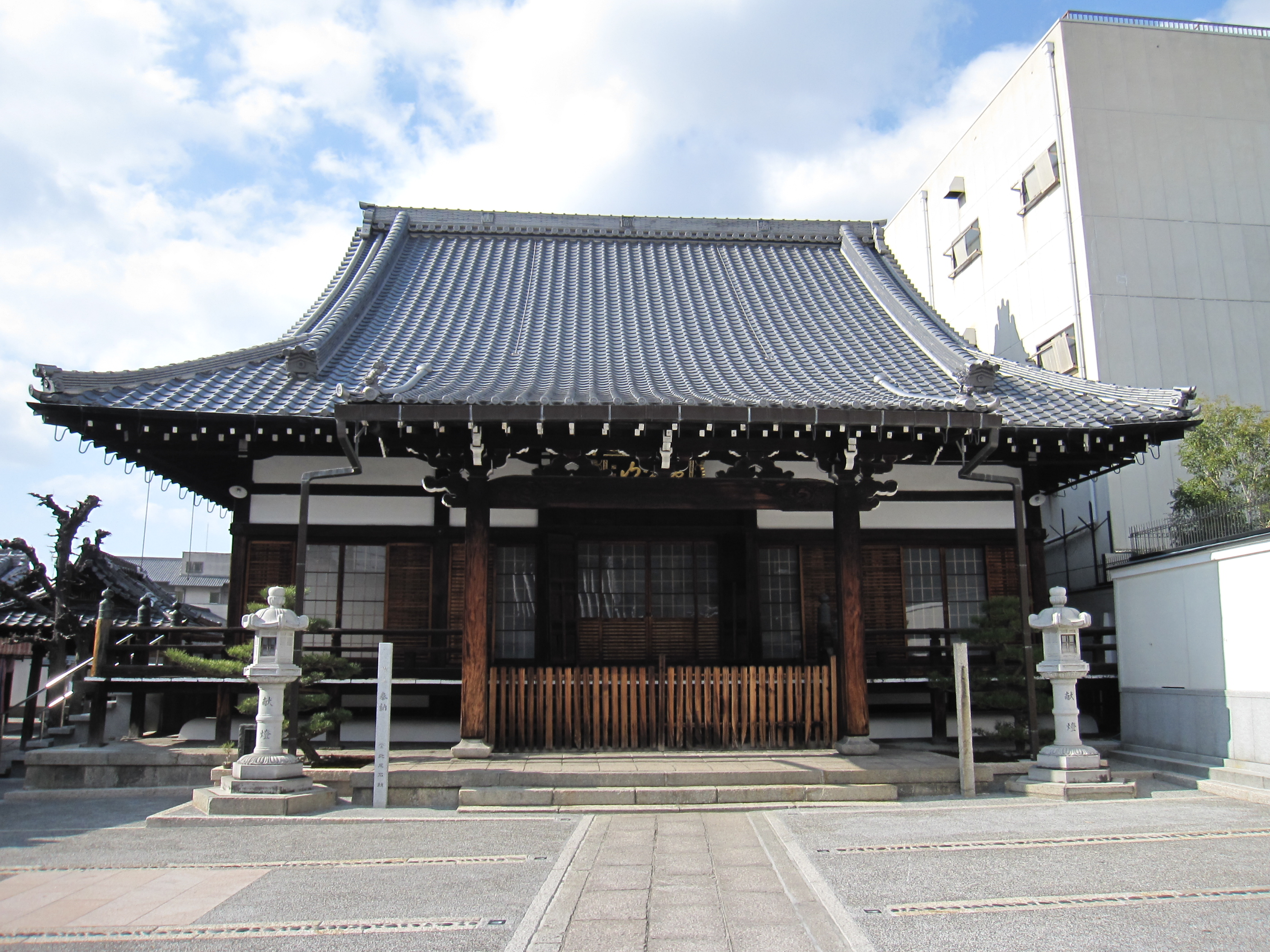 上徳寺（京都市下京区）